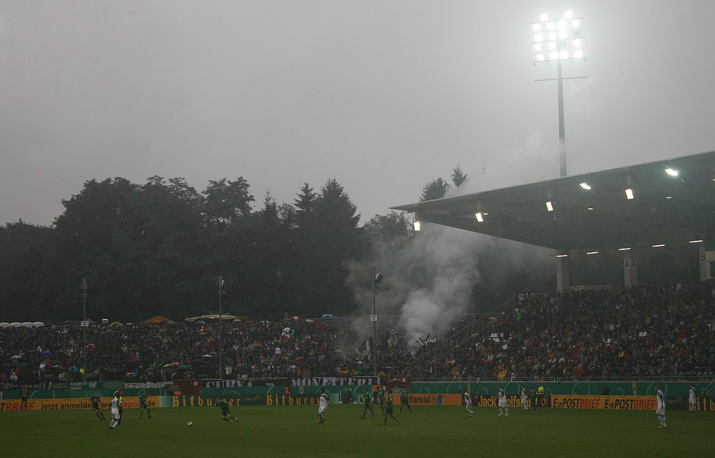 SC Preußen Münster - VfL Wolfsburg, DFB-Pokal, 2010/11, 1. Runde, Endergebnis 1:2 (Rauch und Bengalo im Bereich der Curva Monasteria)